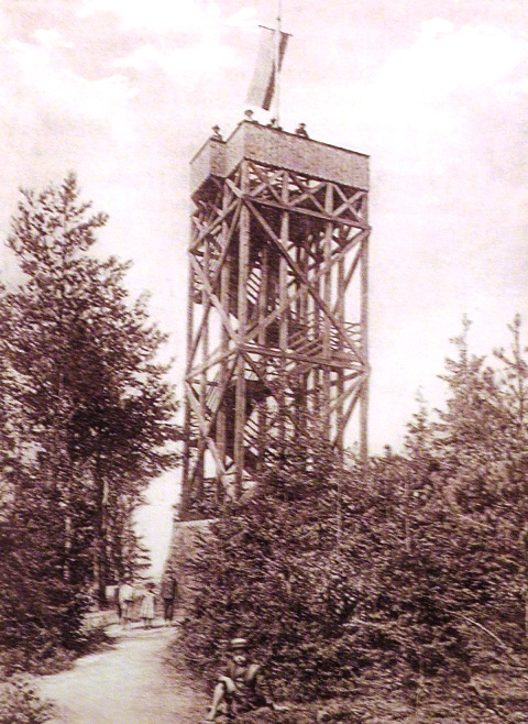 Humboldtova výšina - historická fotografie